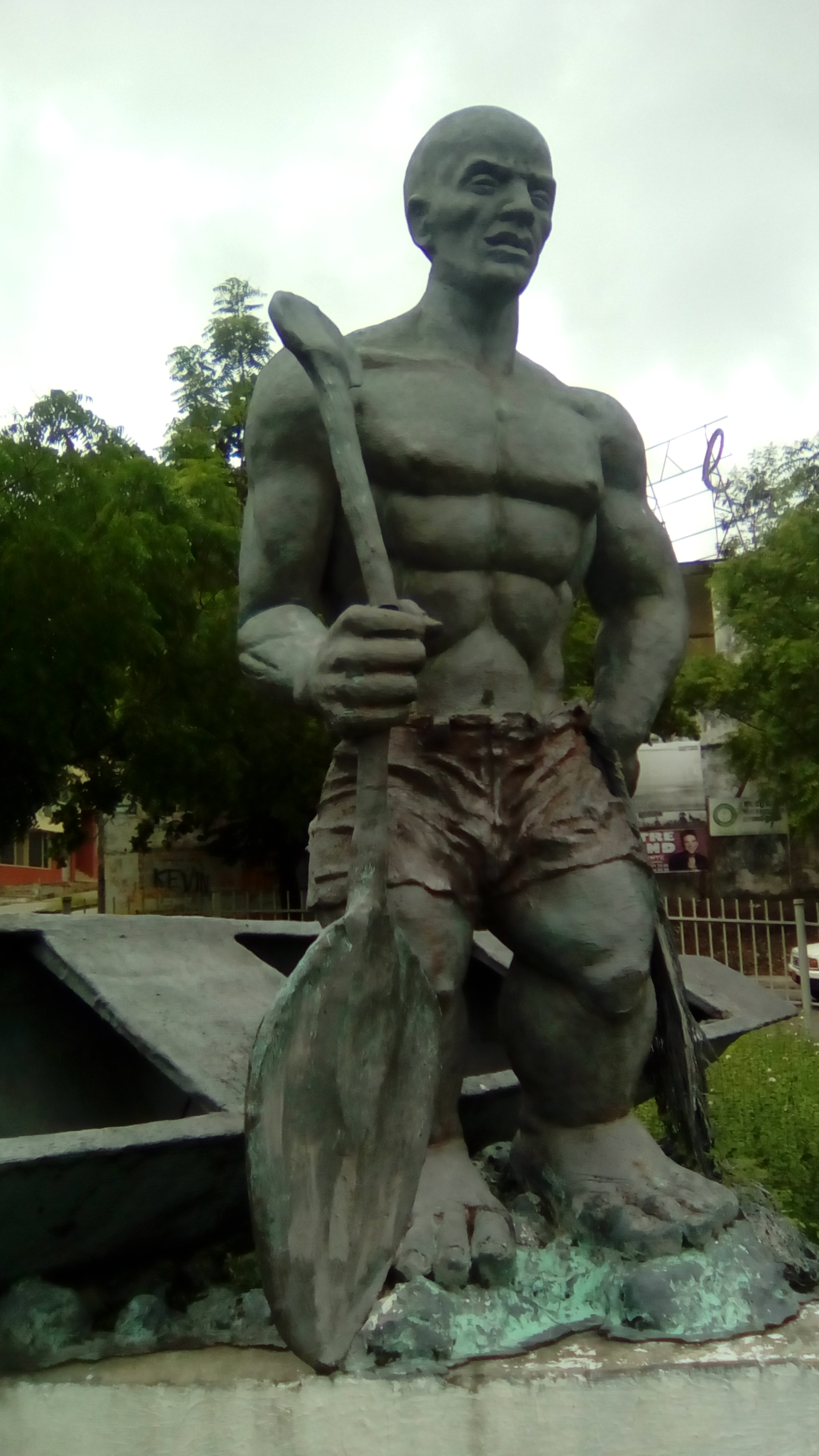 Monumento al pescador, también conocido como el Boga de la libertad, en la ciudad de Honda